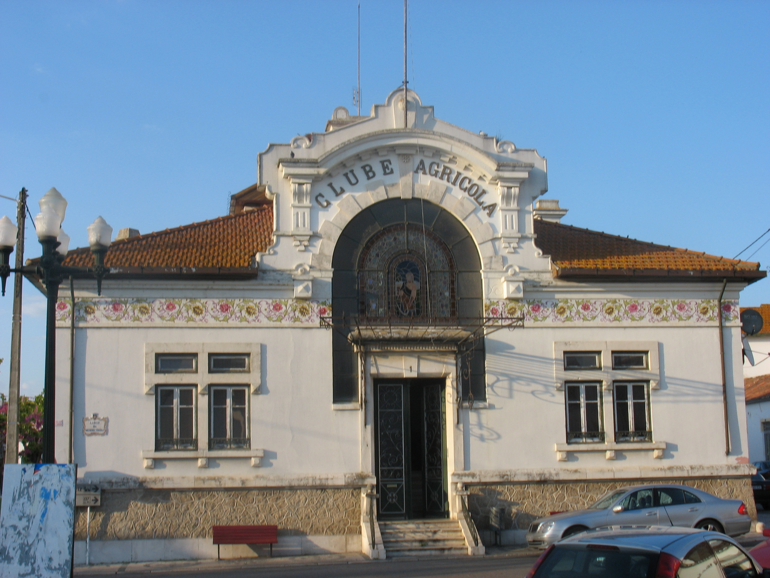 Chamusca (Portugal) - Edifício do Clube Agrícola